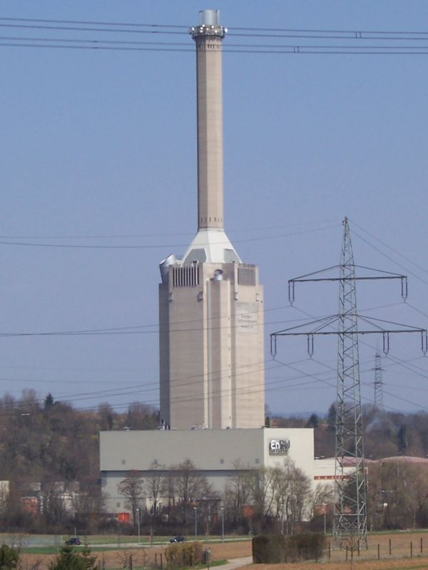 Gas-und-Dampf-Kombikraftwerk Marbach III in Marbach am Neckar